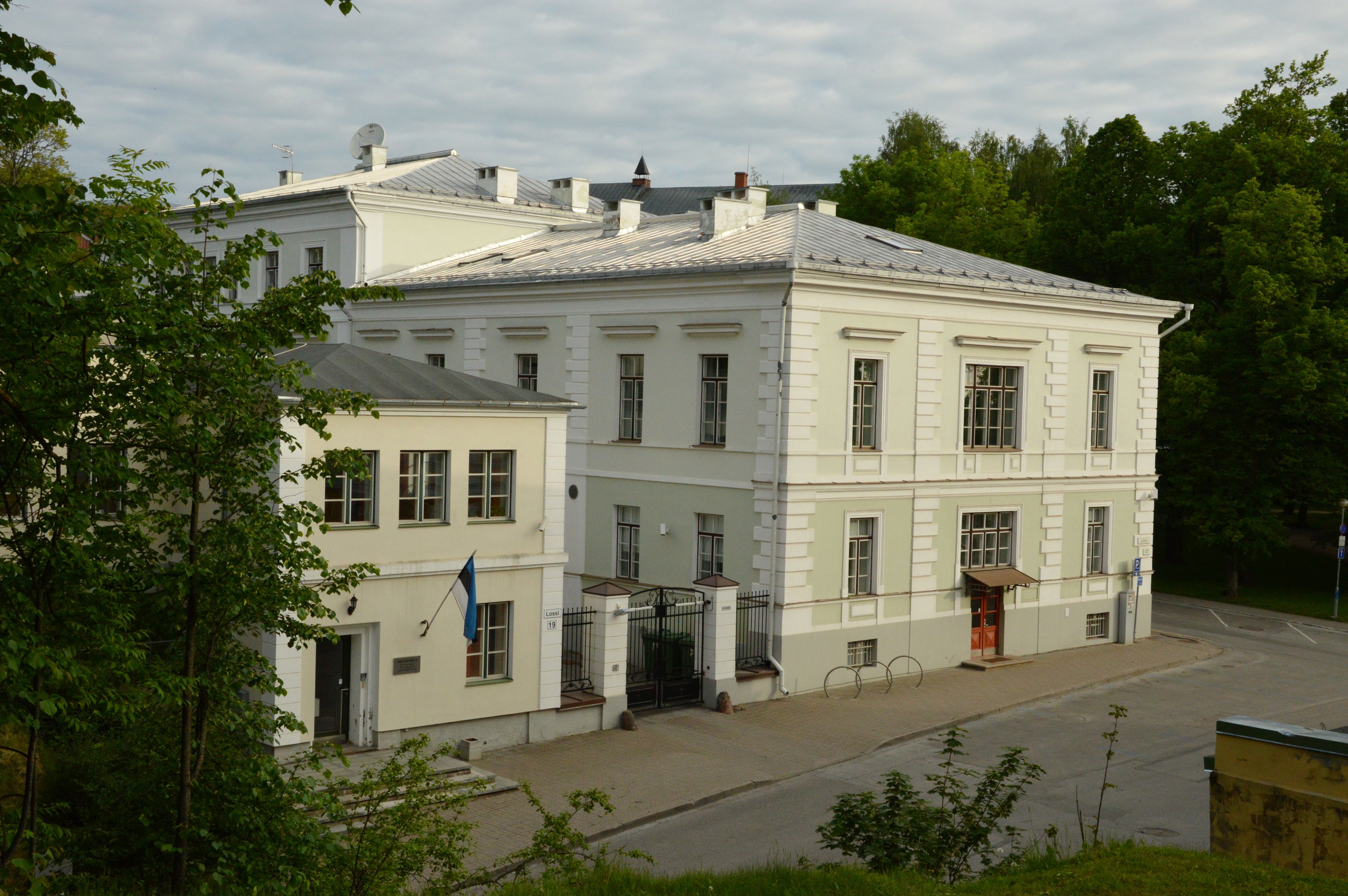 Riigikohtu hoone Toomemäel.